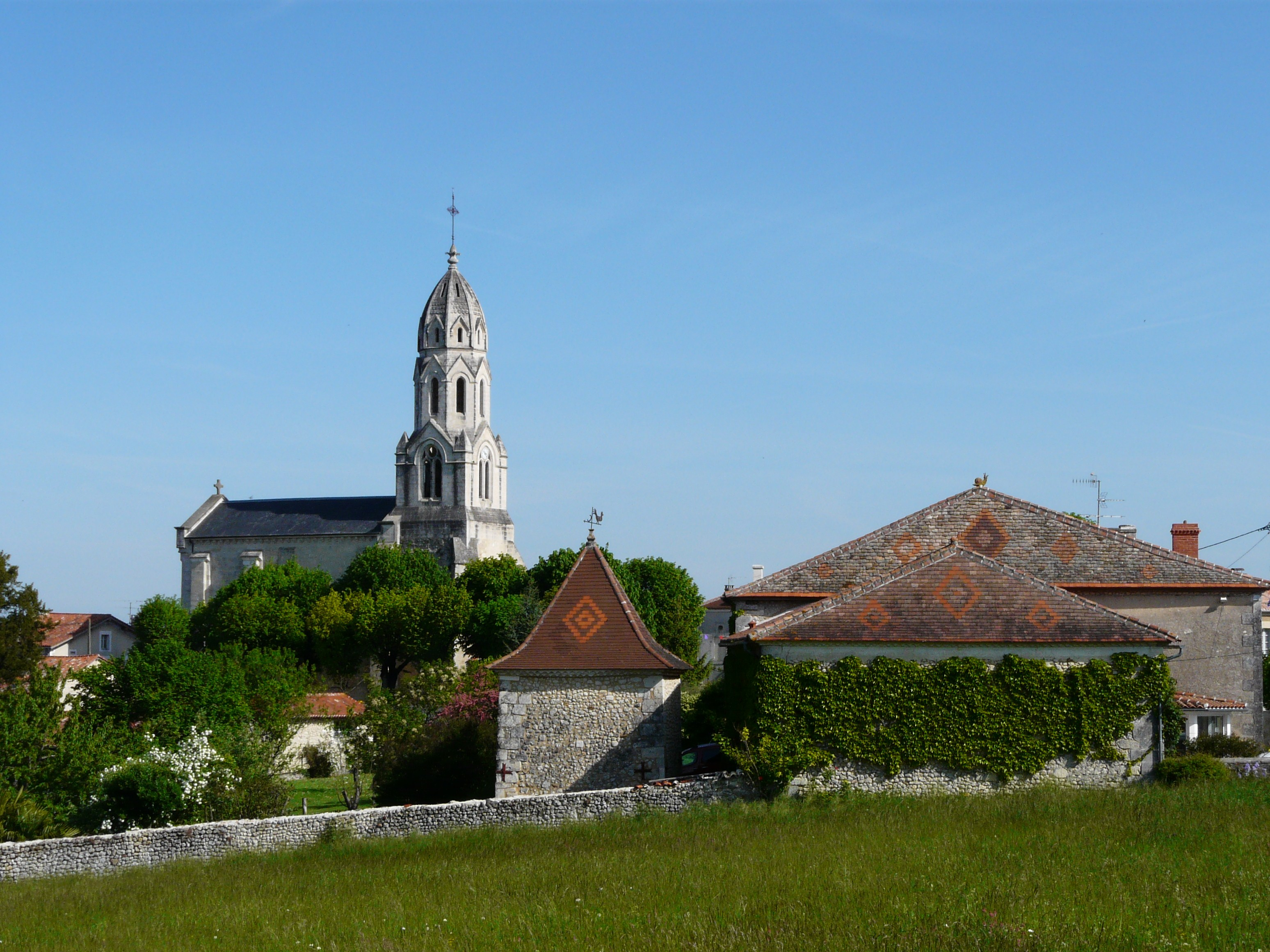 Vue du bourg de Bertric, Bertric-Burée, Dordogne, France